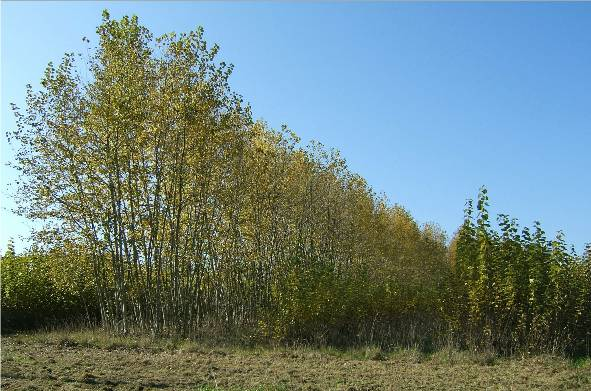 Kurzumtriebskultur aus Hybridpappeln. Links vierjährig, rechts einjähriger Stockausschlag.